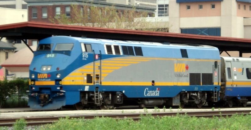 VIA Rail diesel locomotive